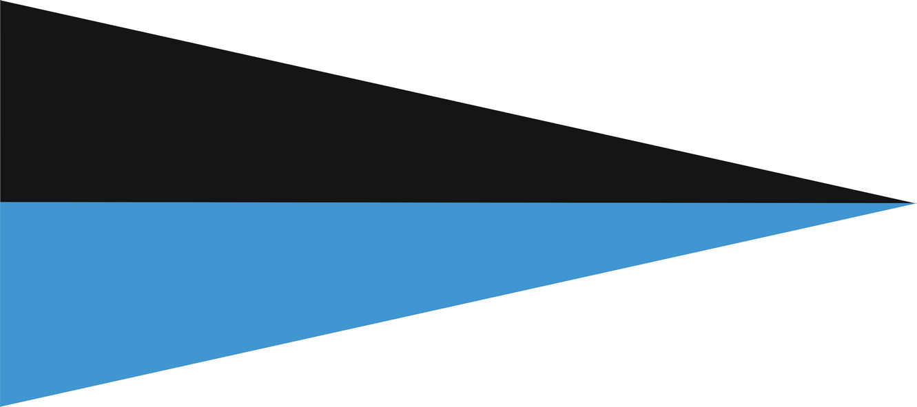 LWP Proporczyk łączności